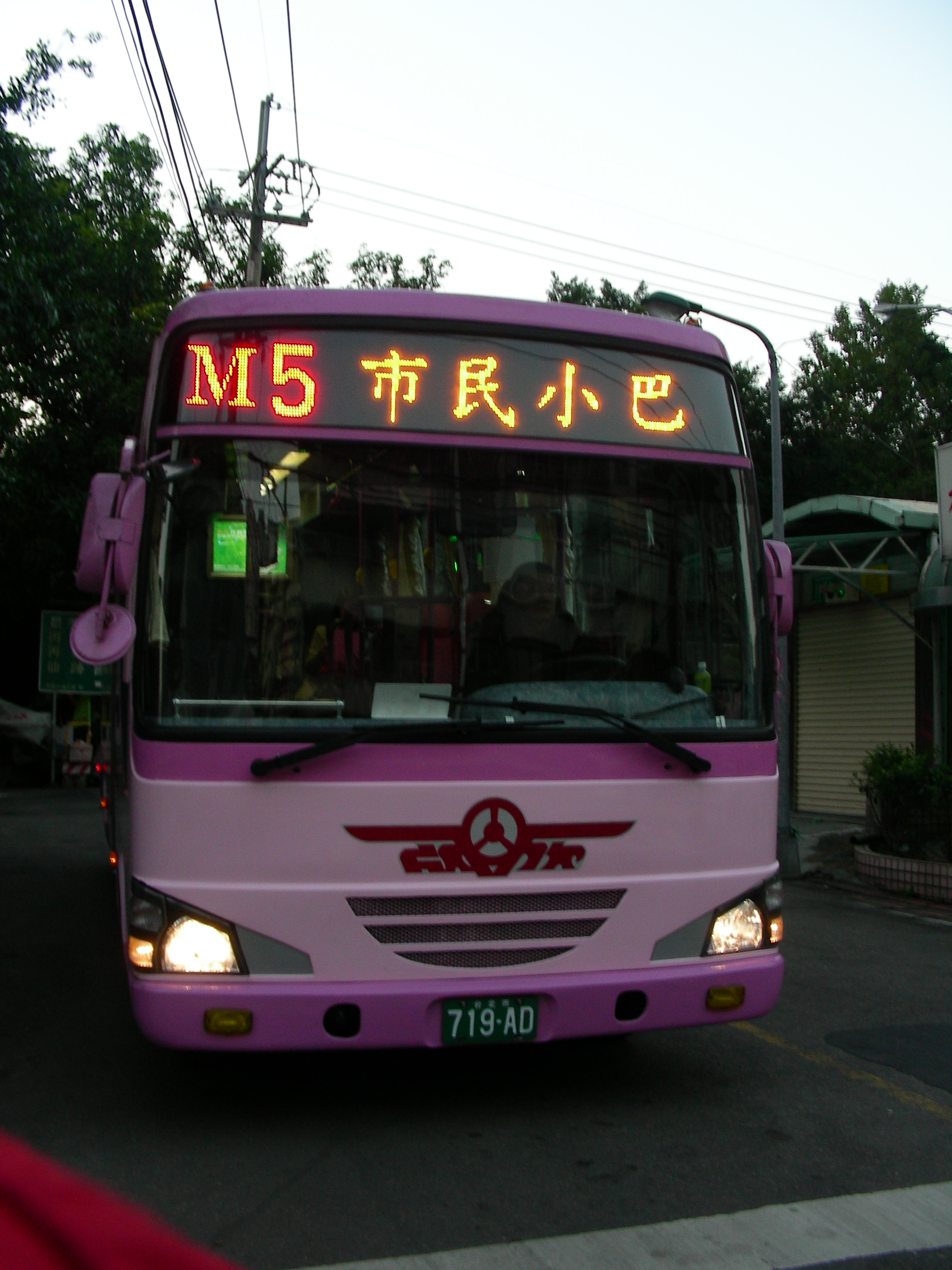 欣欣客運719-AD行駛市民小巴5線，底盤為Isuzu NQR70PBL。